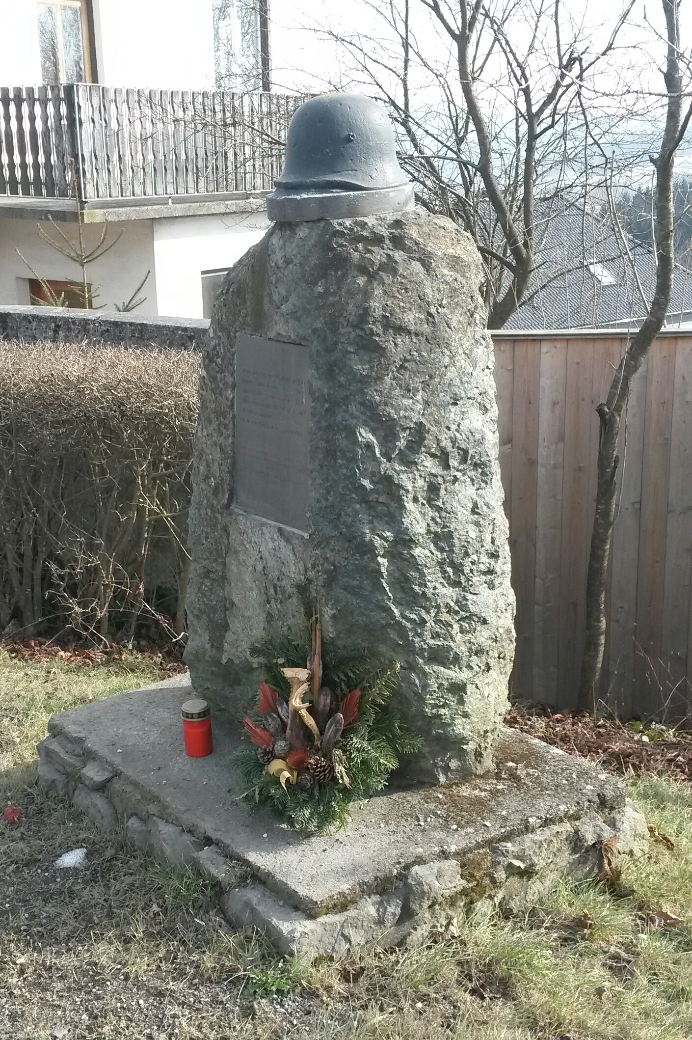 Friedberg Bundesheerdenkmal 1921